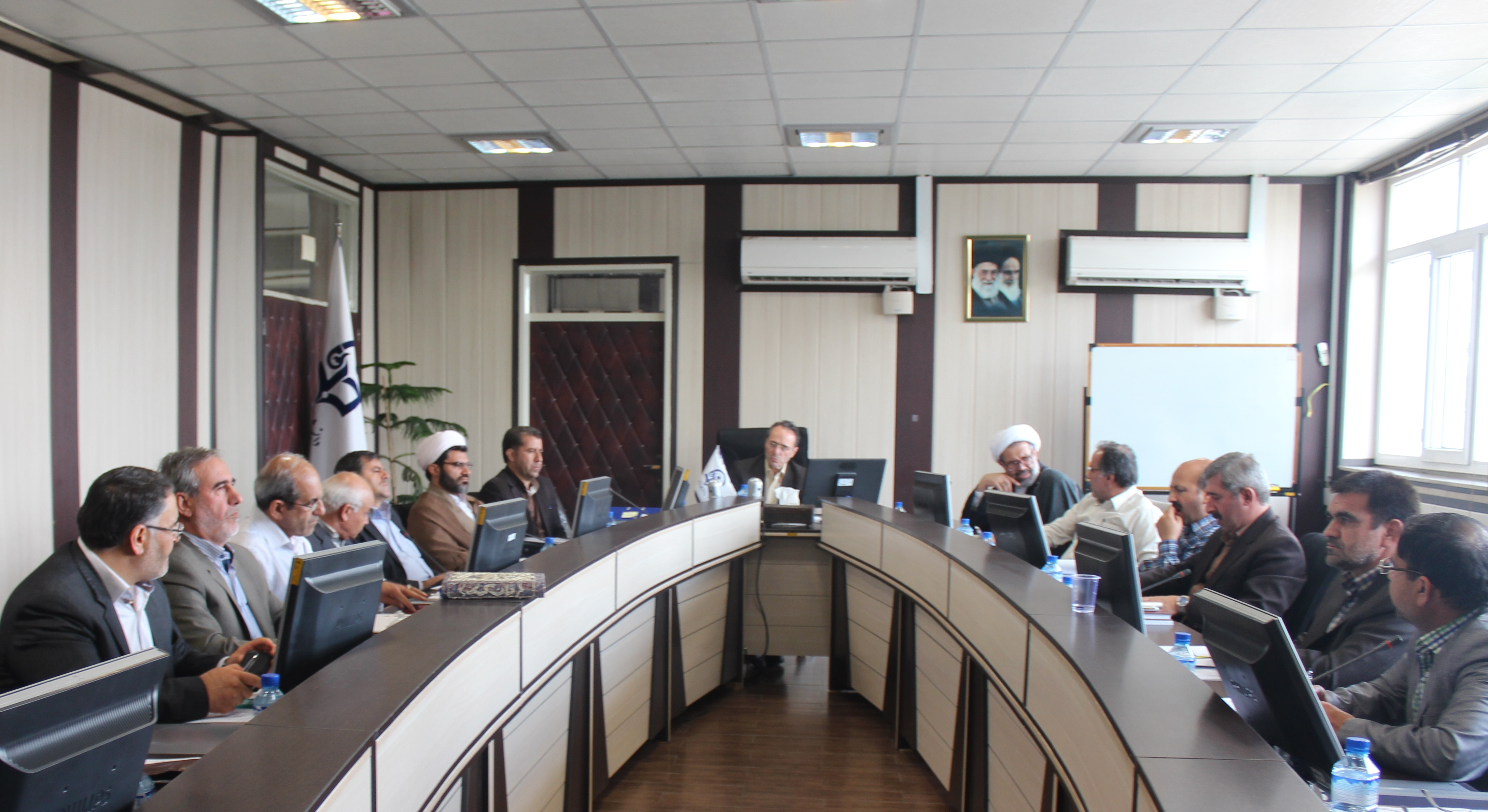 نشستی در سازمان مرکزی دانشگاه فرهنگیان با حضور سرپرست، معاونان و ...